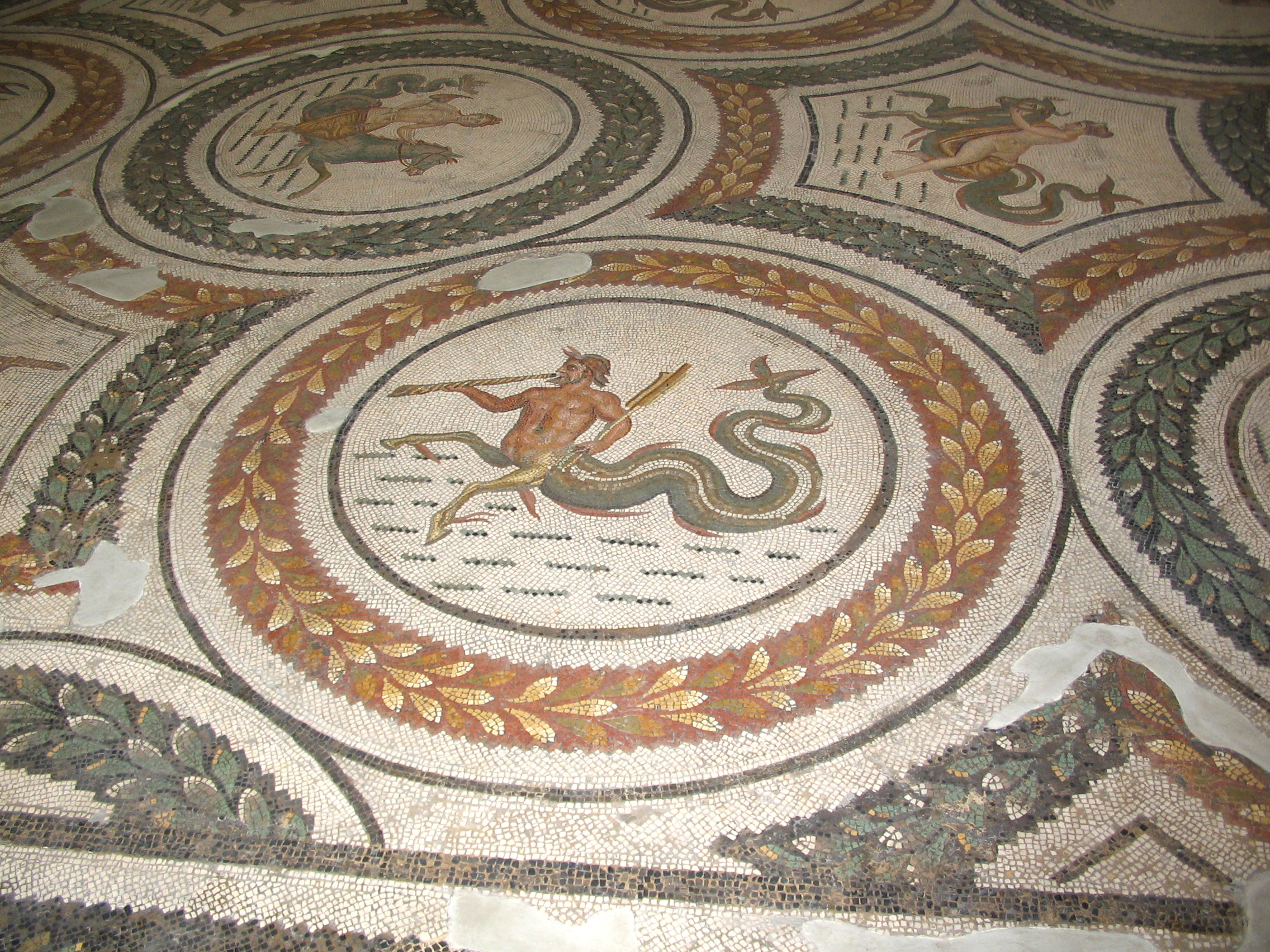 Tritone. Mosaico romano, III sec, Museo nazionale del Bardo,Tunisi.